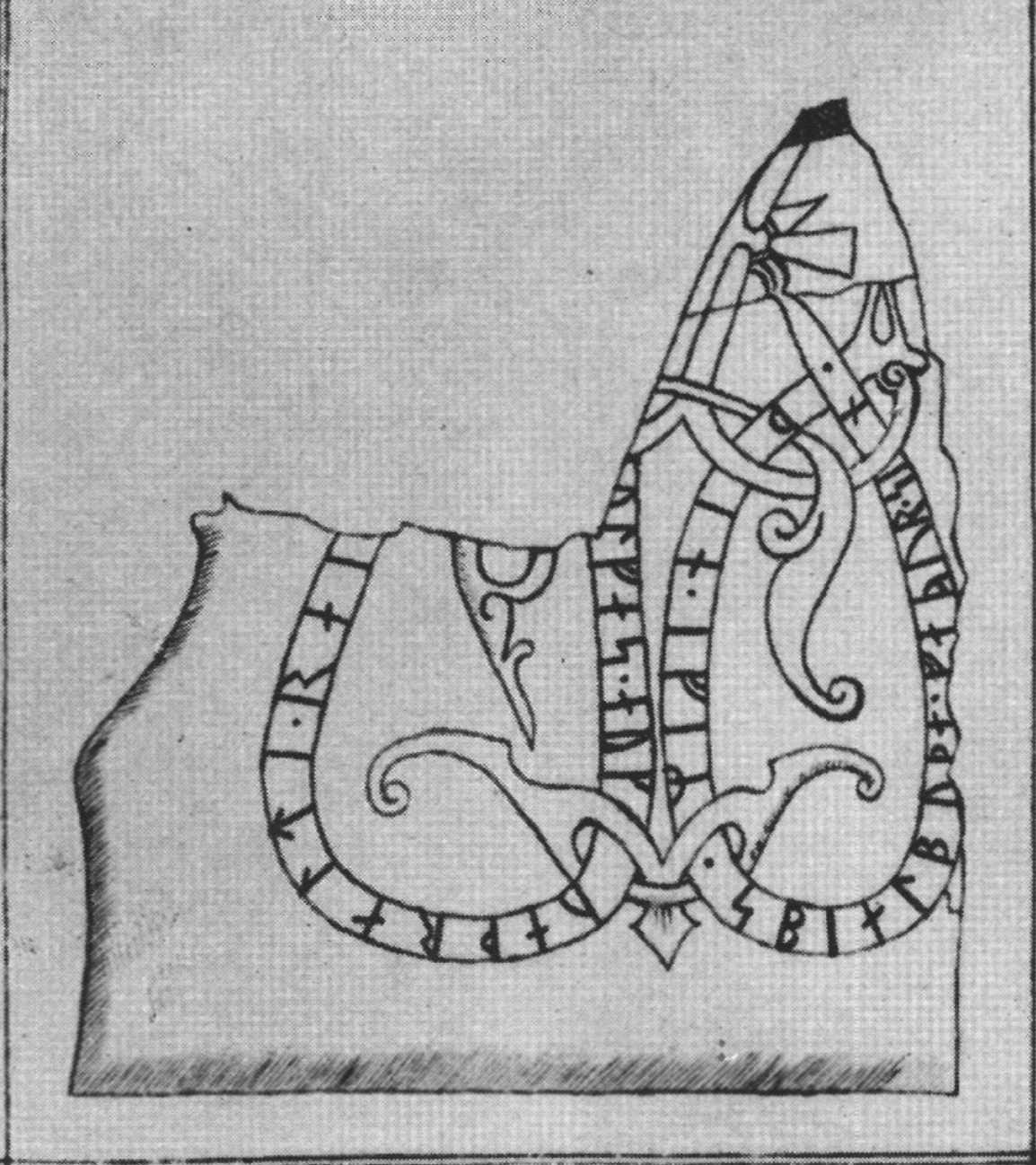 U 865. Vik, Balingsta sn. Efter teckning av Khezelius.